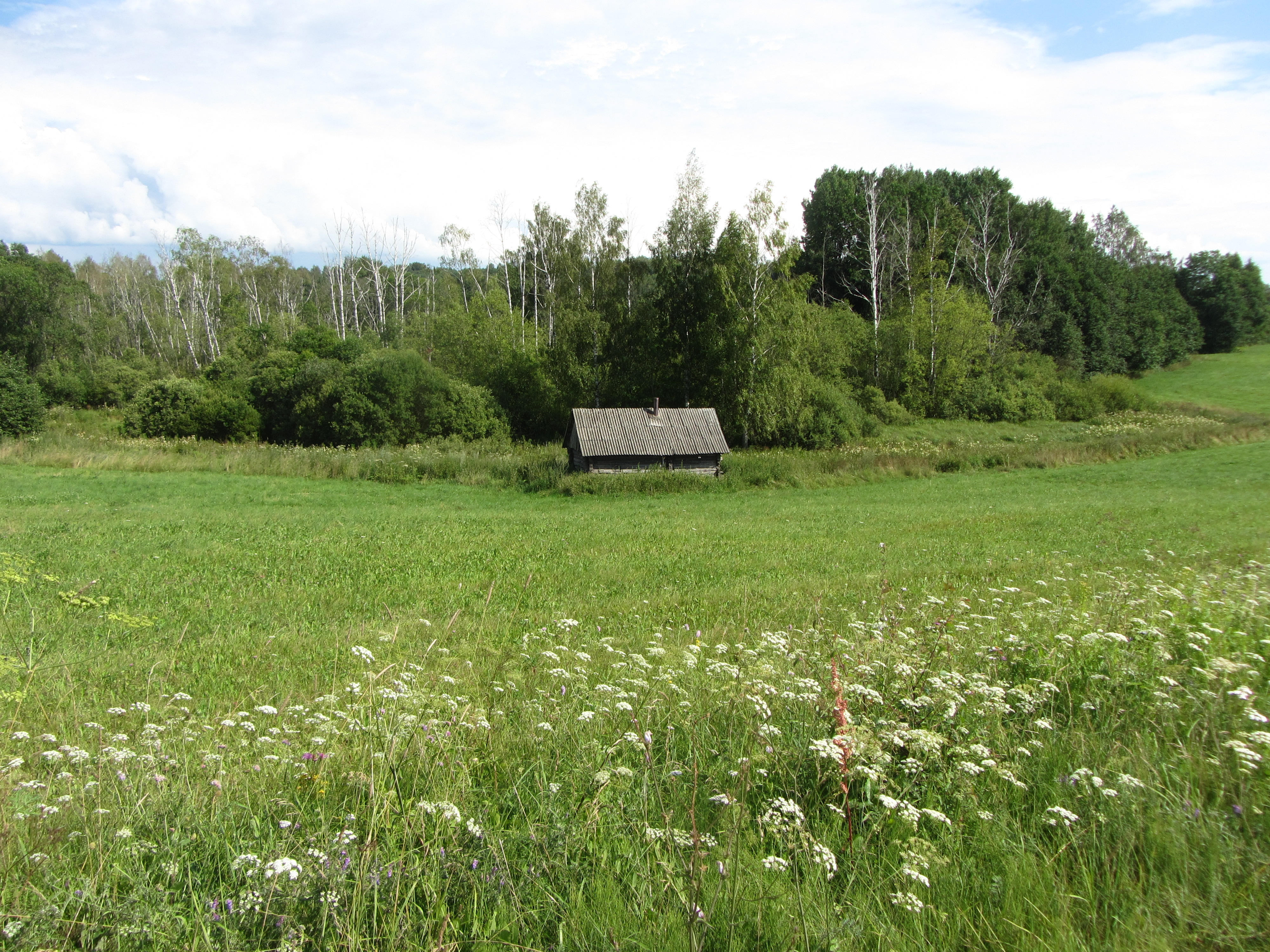 Antalieptės sen., Lithuania